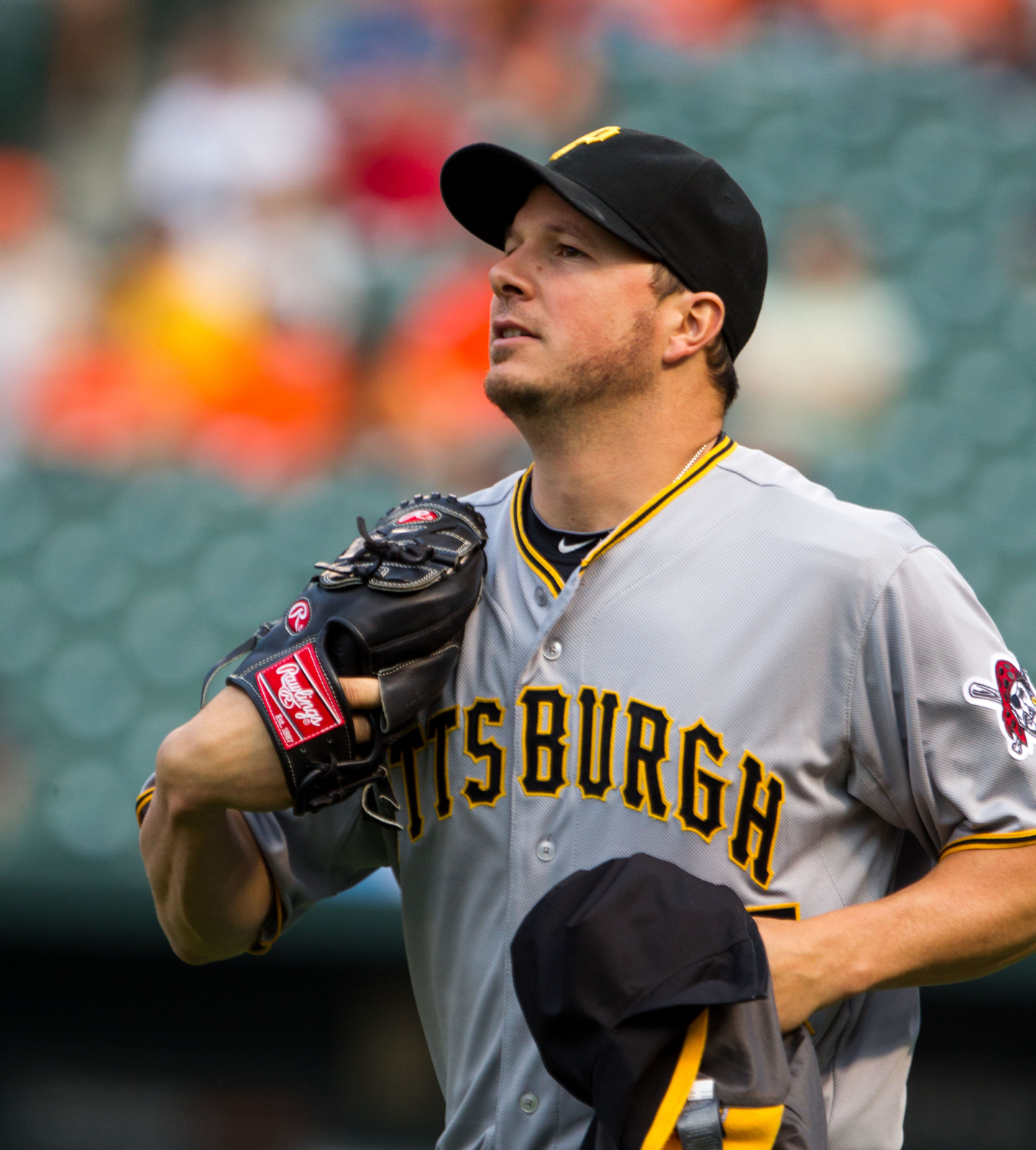 Érik Bédard